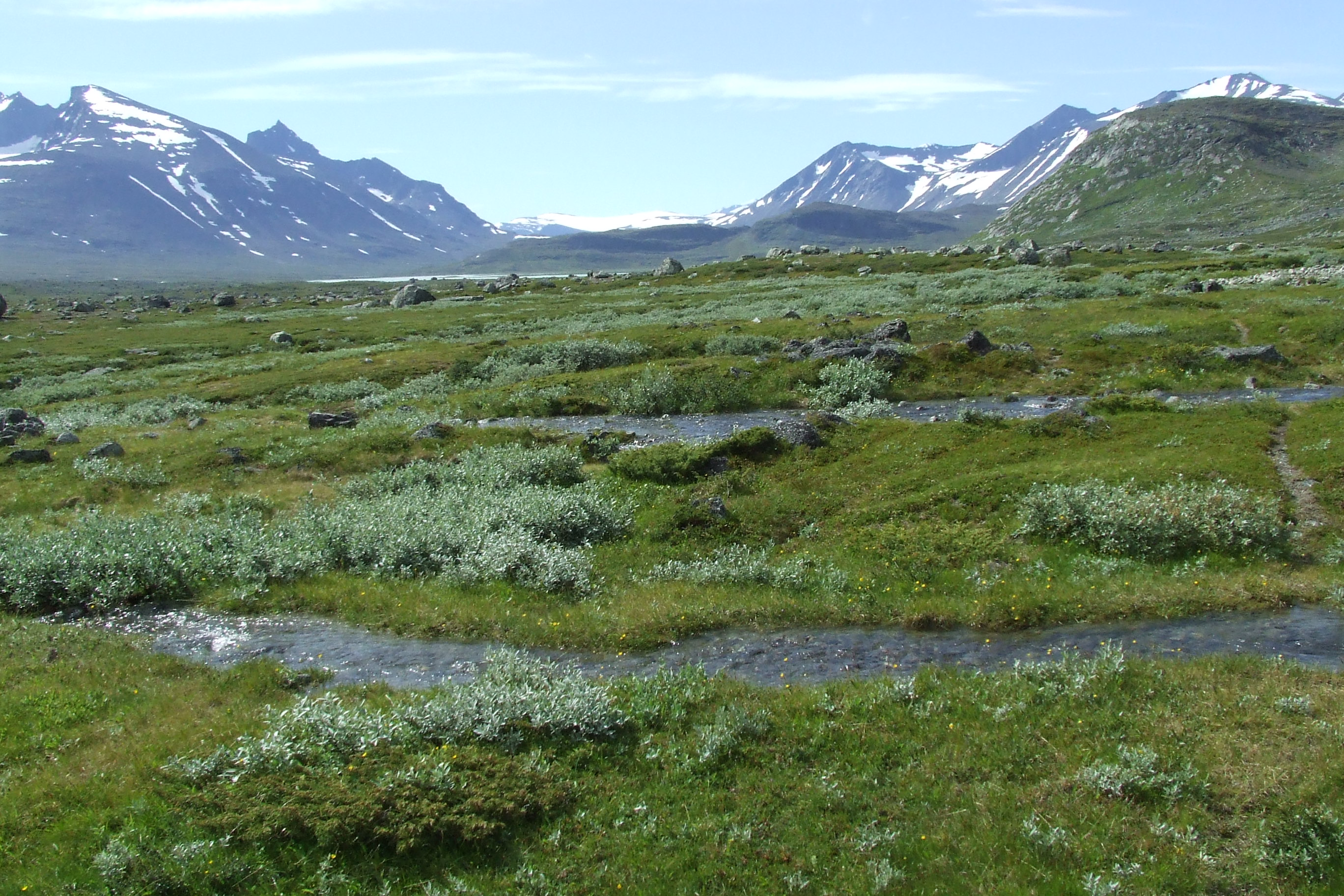 Tal des Bierikjåhkå im Sarek Nationalpark mit Blick nach Südwesten